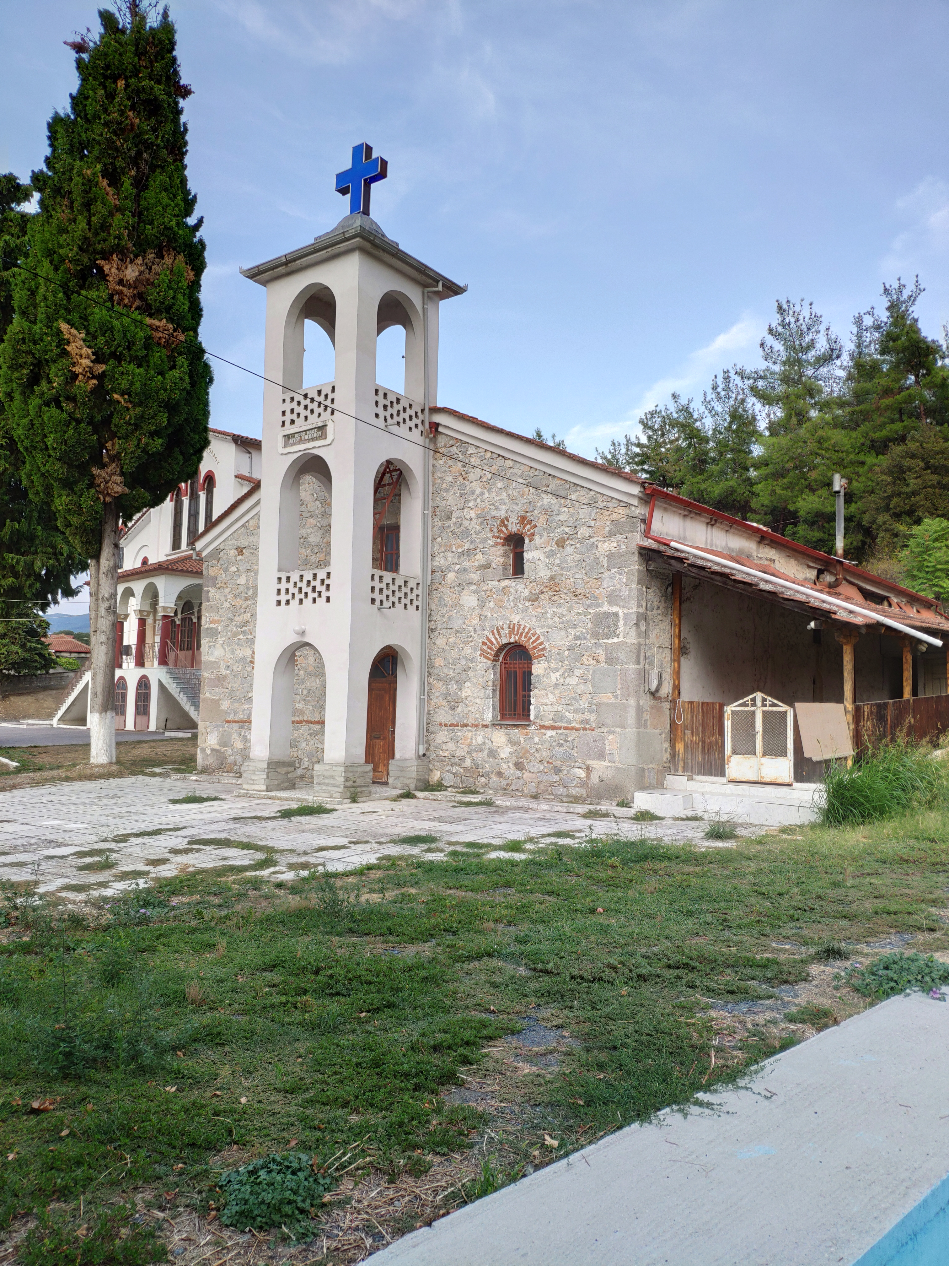 Ναός Αγίου Νικολάου στην Ίδα«Ναός Αγίου Νικολάου στην Ίδα»